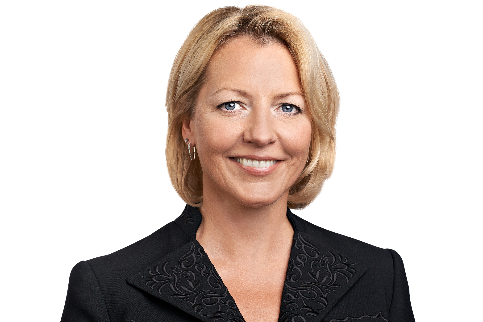 Vilja Savisaar-Toomast 2015. aastal.